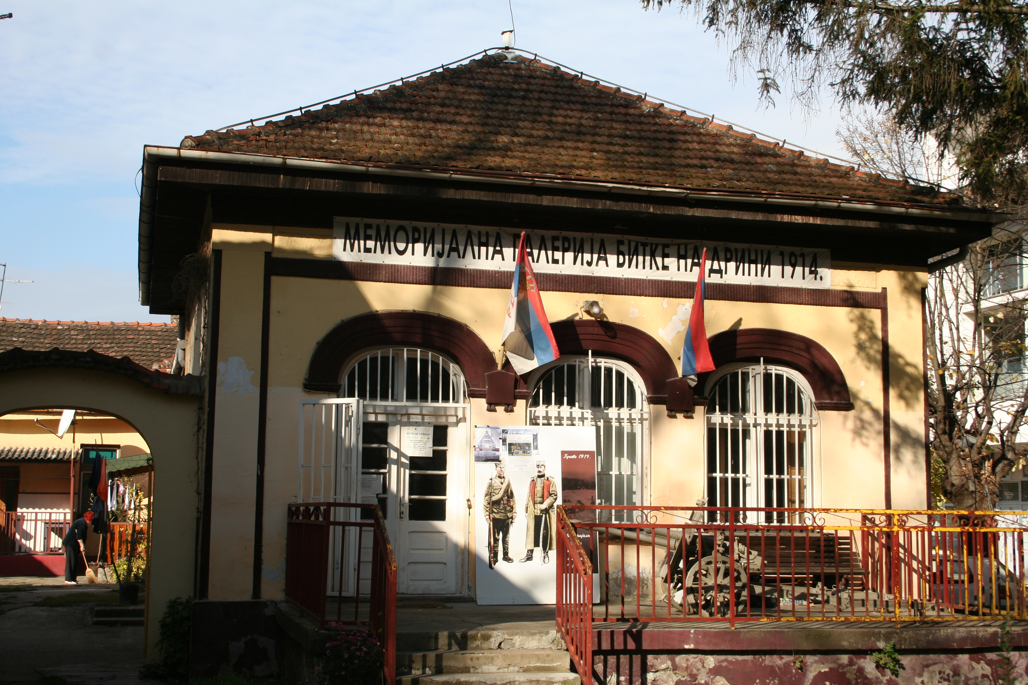 Memorijalna galerija Bitke na Drini 1914. Banja Koviljača